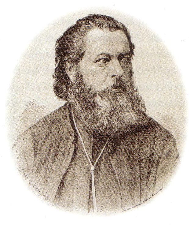 Lithographie von Isidor Worobkiewicz (1836-1903)